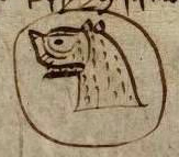 Selo de Pedro Dominguez, notario xurado do concello de Melide, Galiza.